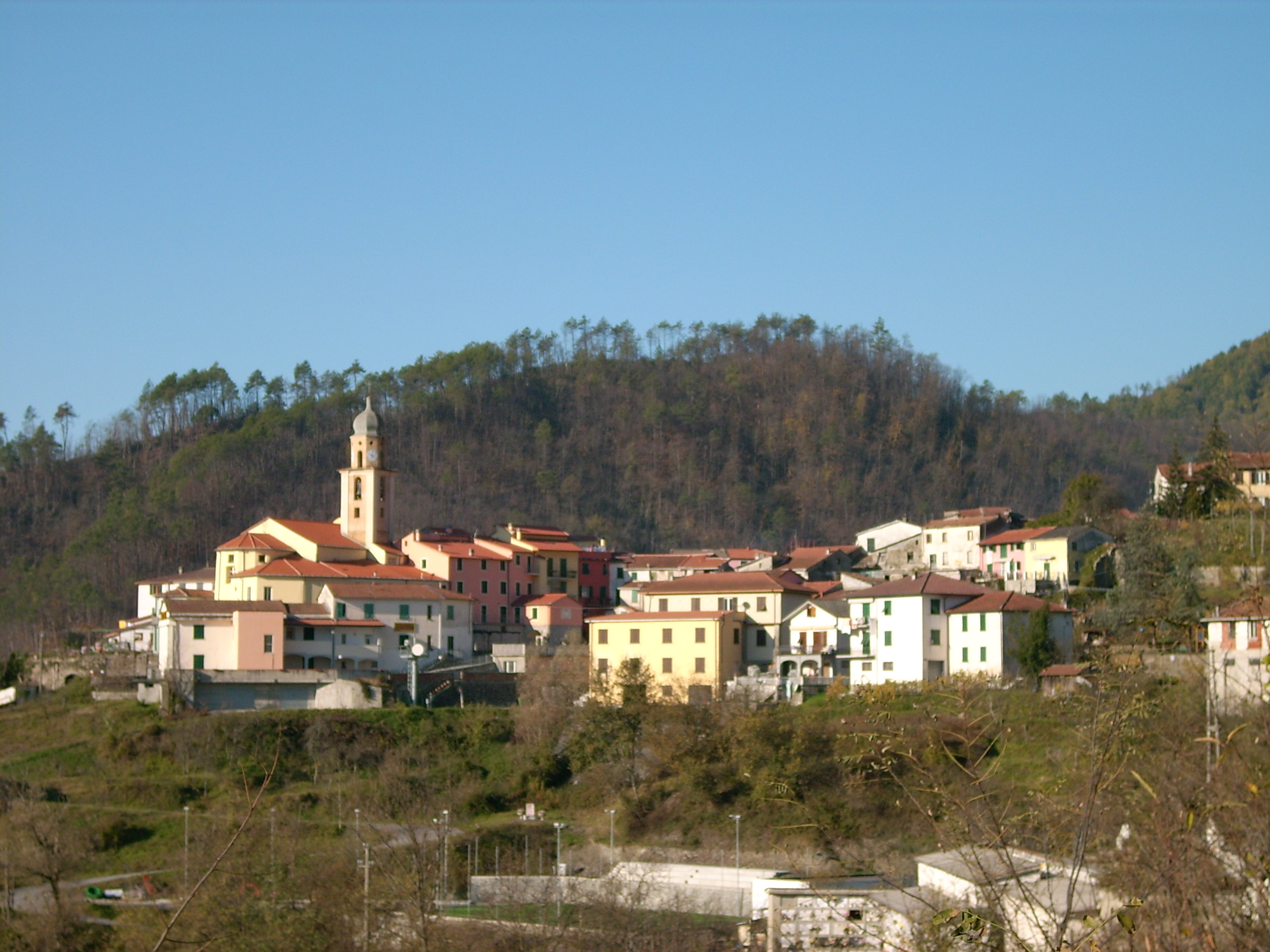 Carrodano, Liguria, Italia